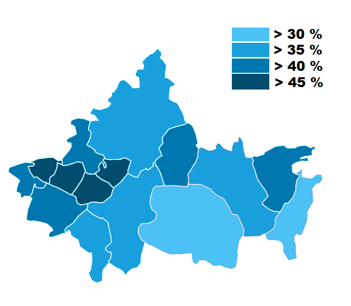 Erststimmen Ergebnisse im Wahlkreis 59 bei der Landtagswahl in Sachsen 2019